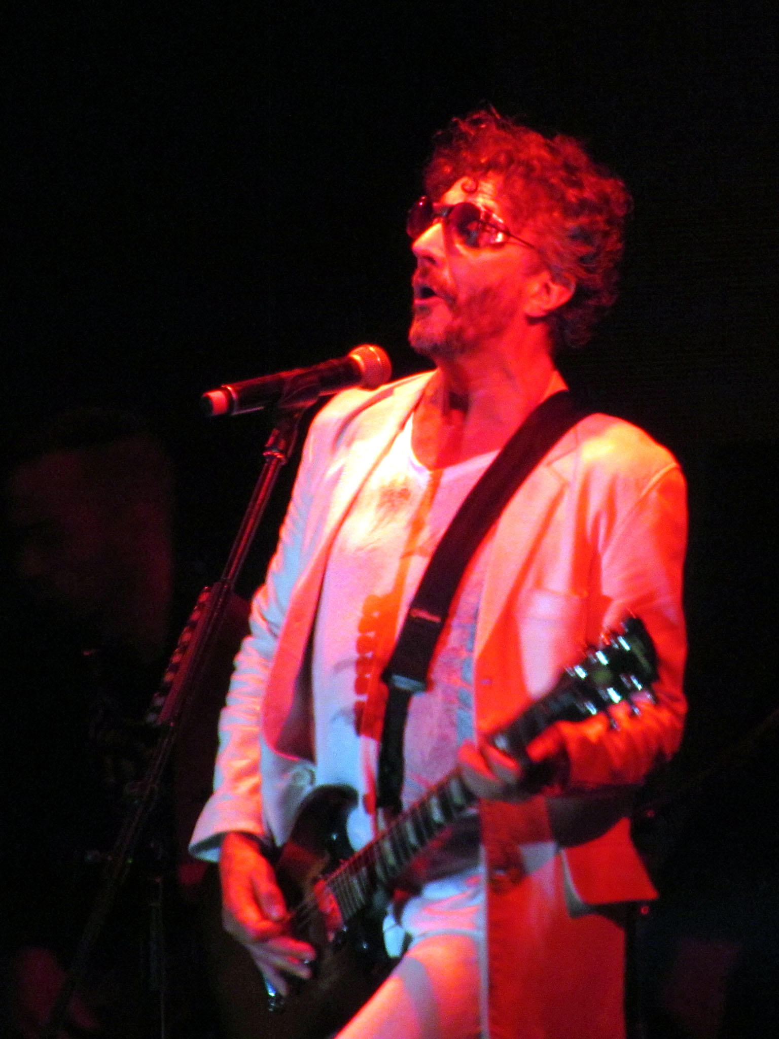 Curico, Fiesta de la vendimia 2015